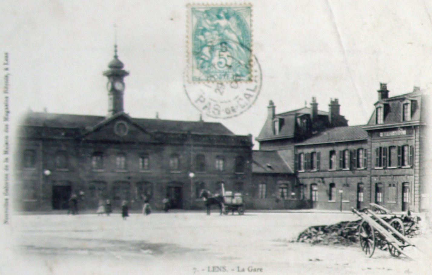 carte postale envoyée le 29 mai 1906 représentant la gare de Lens.